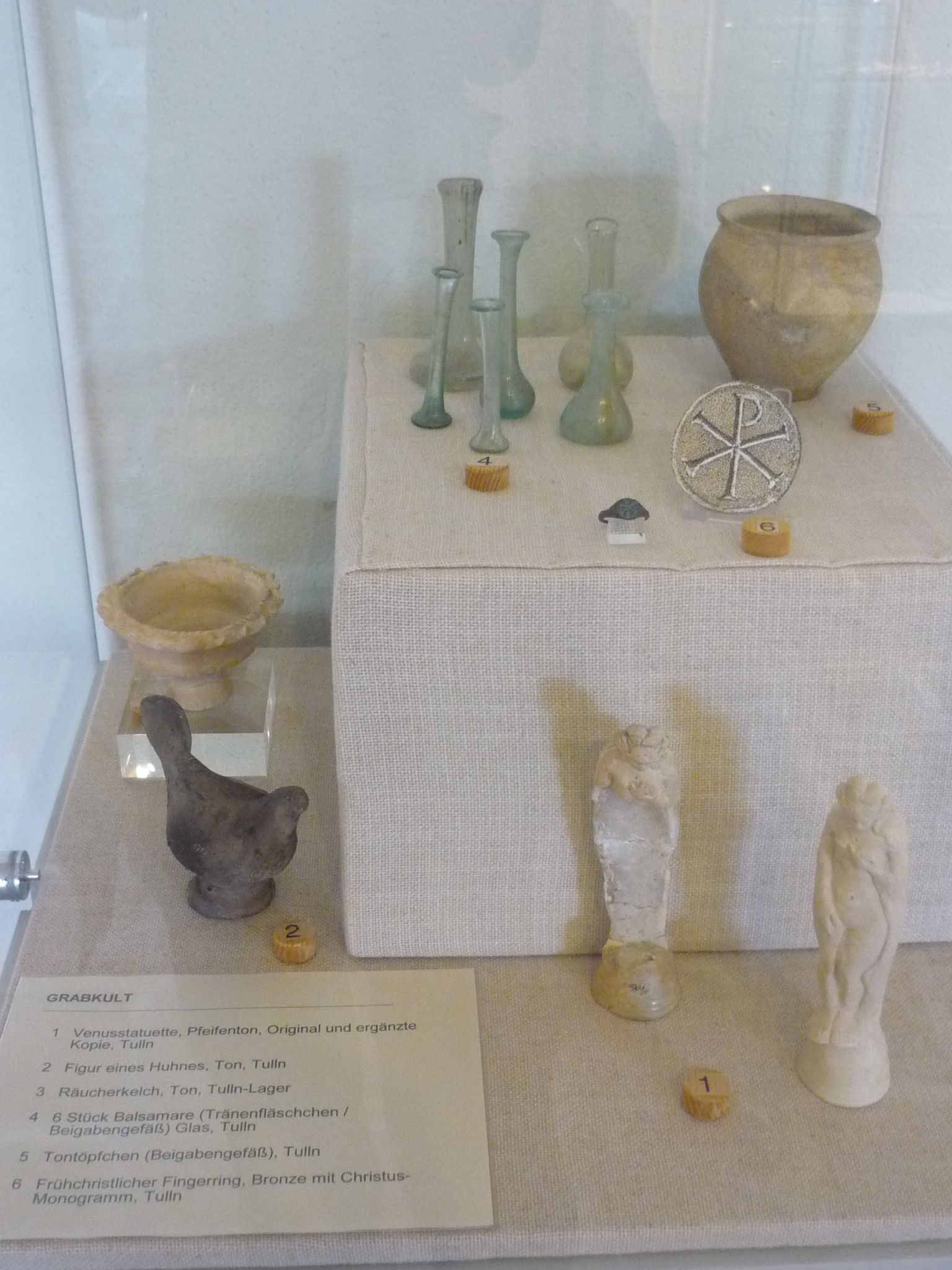 Grabbeigaben aus den Gräberfelder von Comagena; Römermuseum Tulln